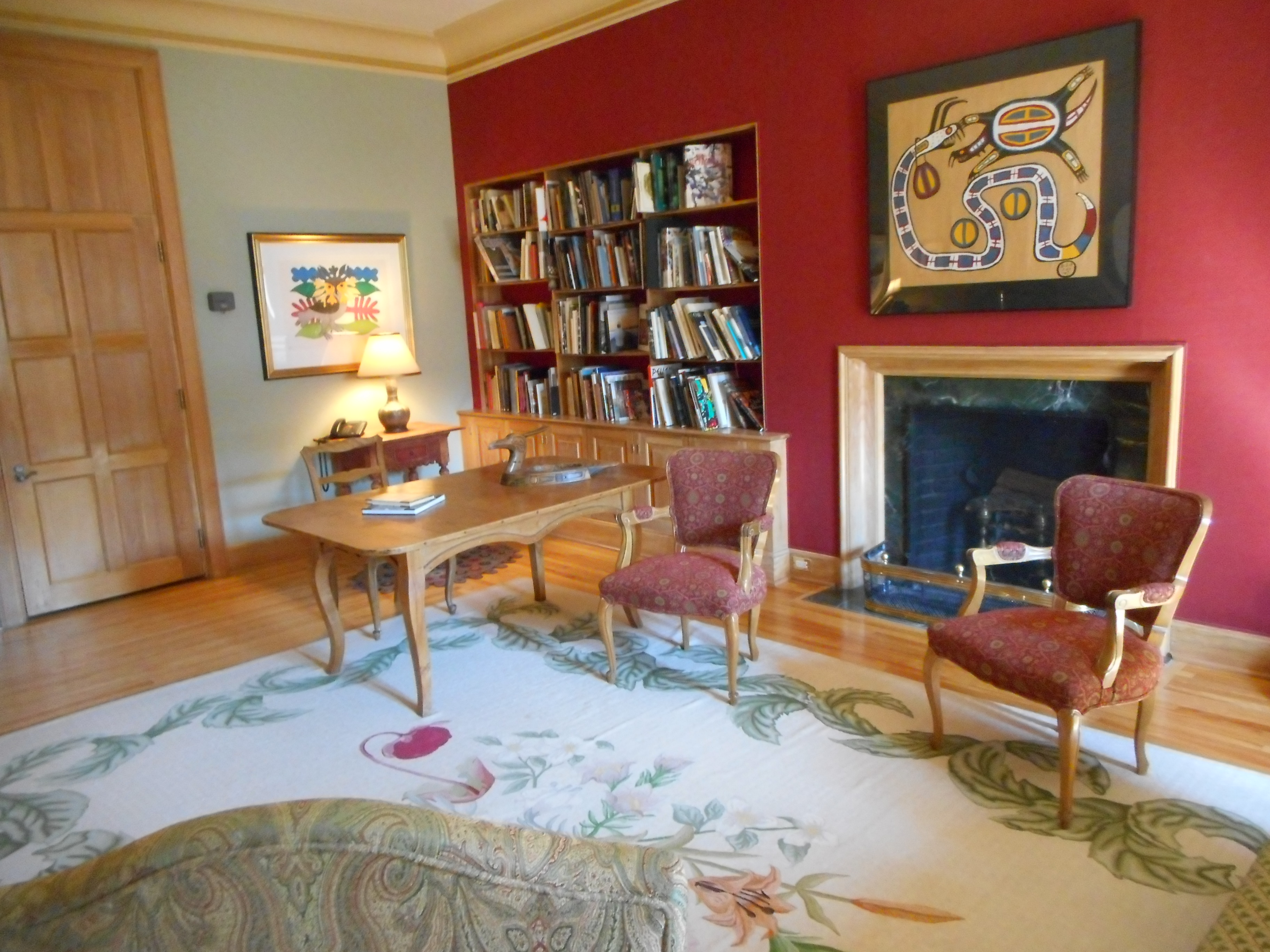 Rideau Hall, Ottawa